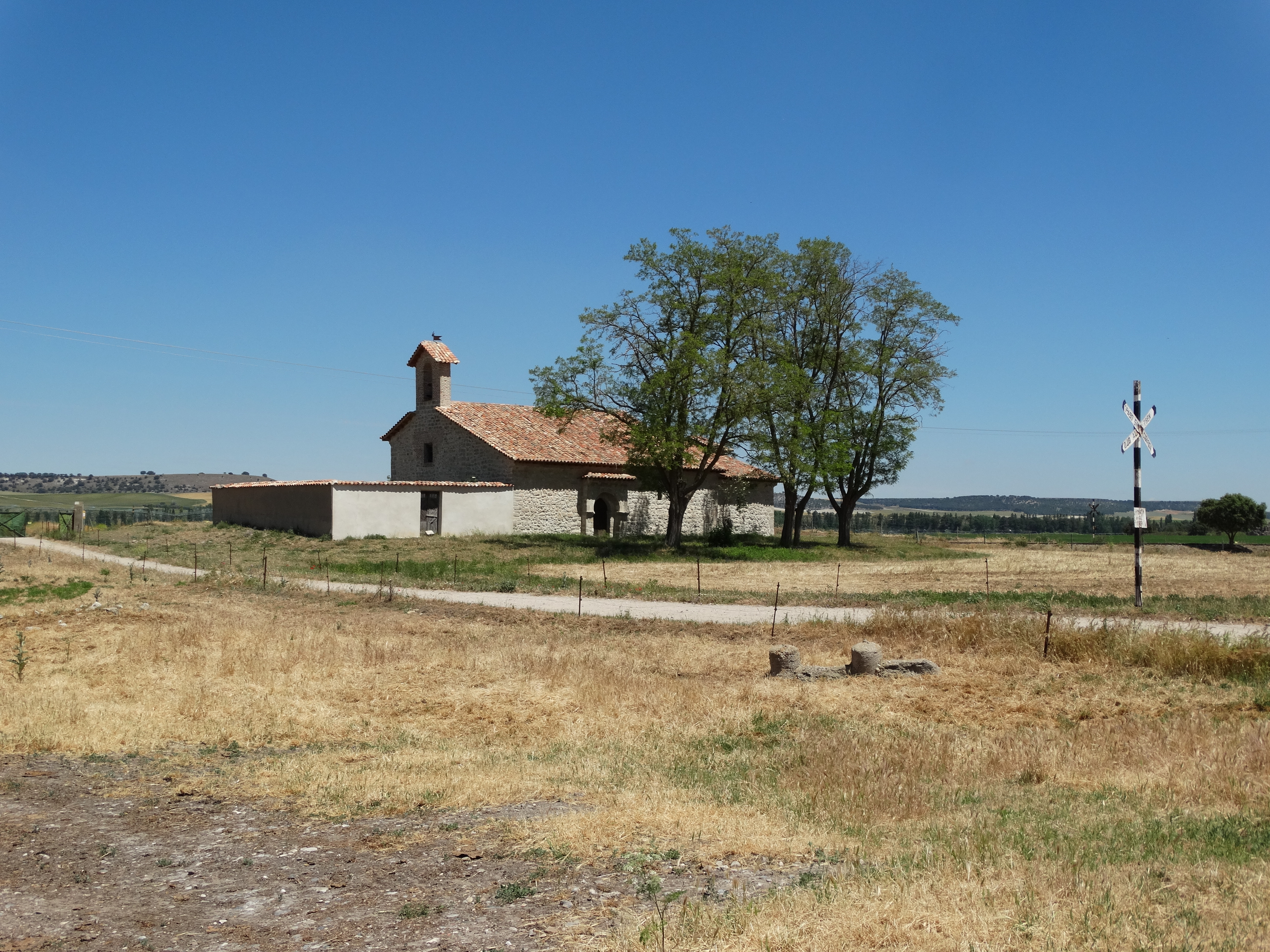 Valladolid, España. Despoblado de Fuentes de Duero. Iglesia románica y su entorno, dedicada a Santiago. Está restaurada.